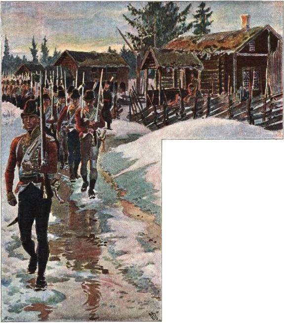 Illustrasjon til kapitlet «Opmarsj ved grænsen»